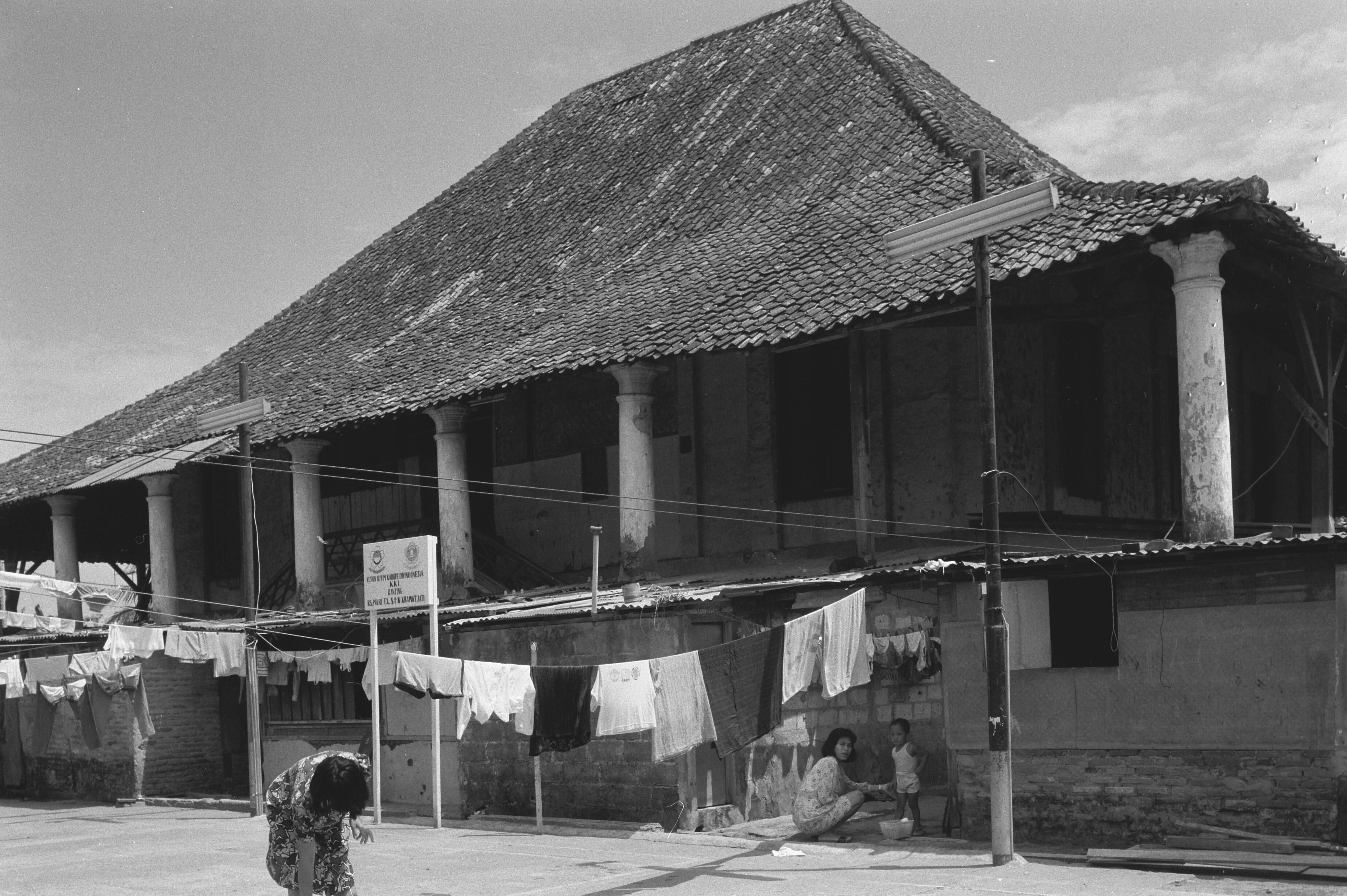 Cililitan Besar, voormalig landhuis, voorgalerijOnderwerp: Landhuizen, gallerijen